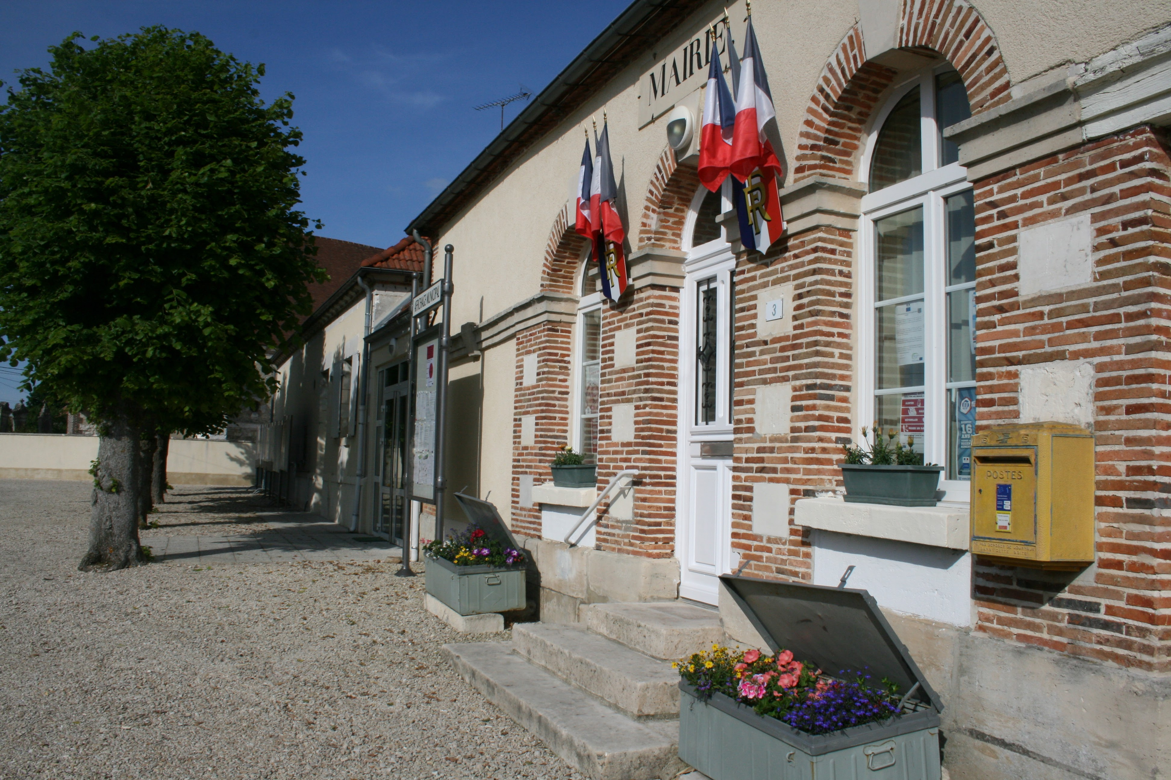 Façade de la Mairie et de l'Entrée de la salle polyvalente "Paulette Henriet".